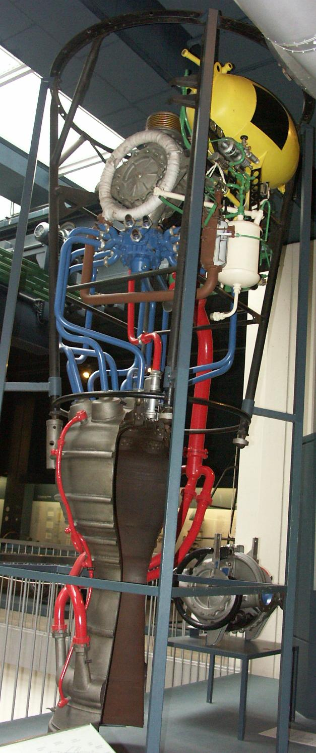 Deutsches Museum de Munich Vue en coupe du moteur (2) Photo Jean-Patrick Donzey